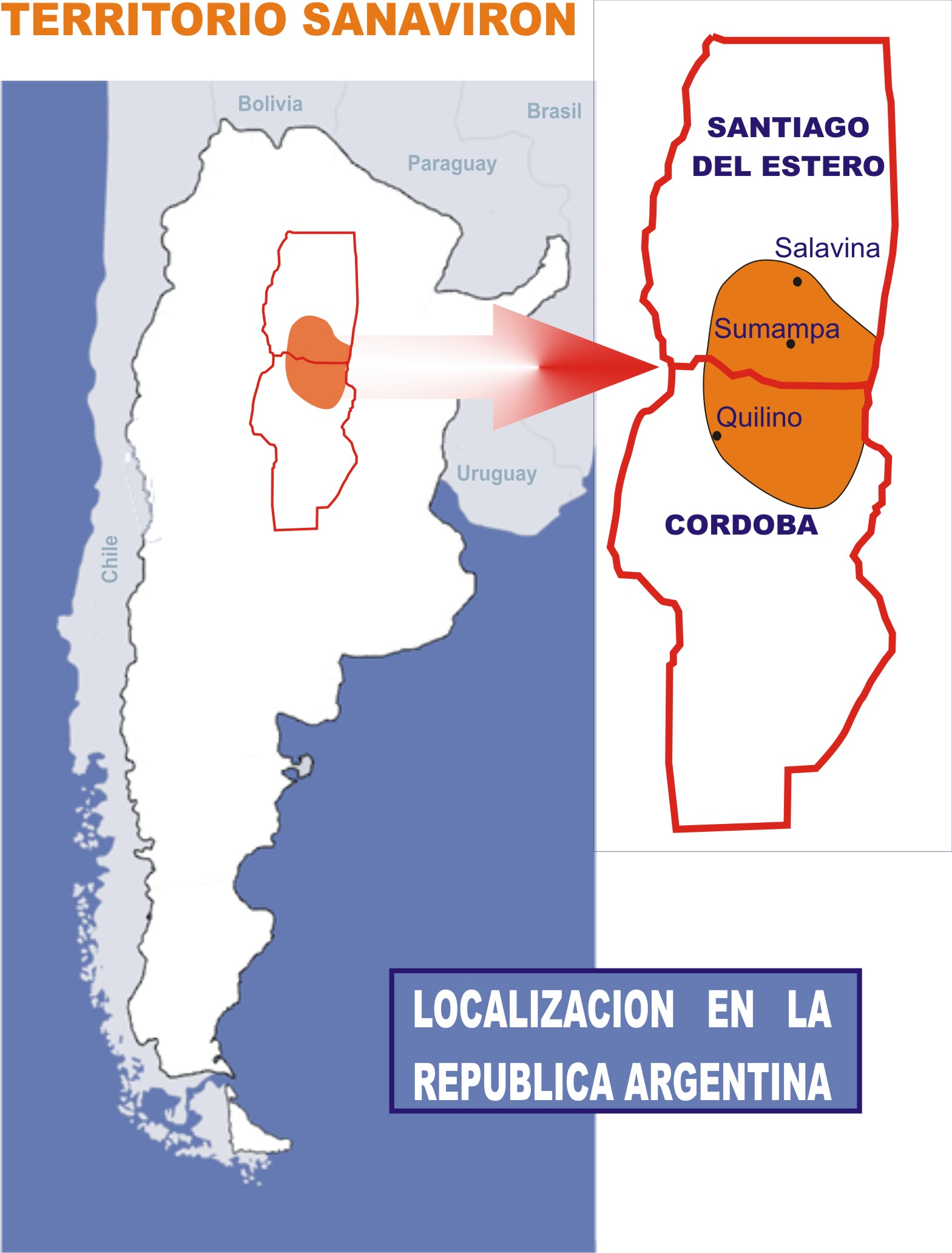 Ubicación geografica, del territorio Sanaviron.